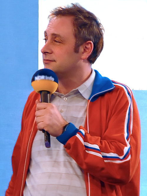 Emmanuel Peterfalvi, Kabarettist